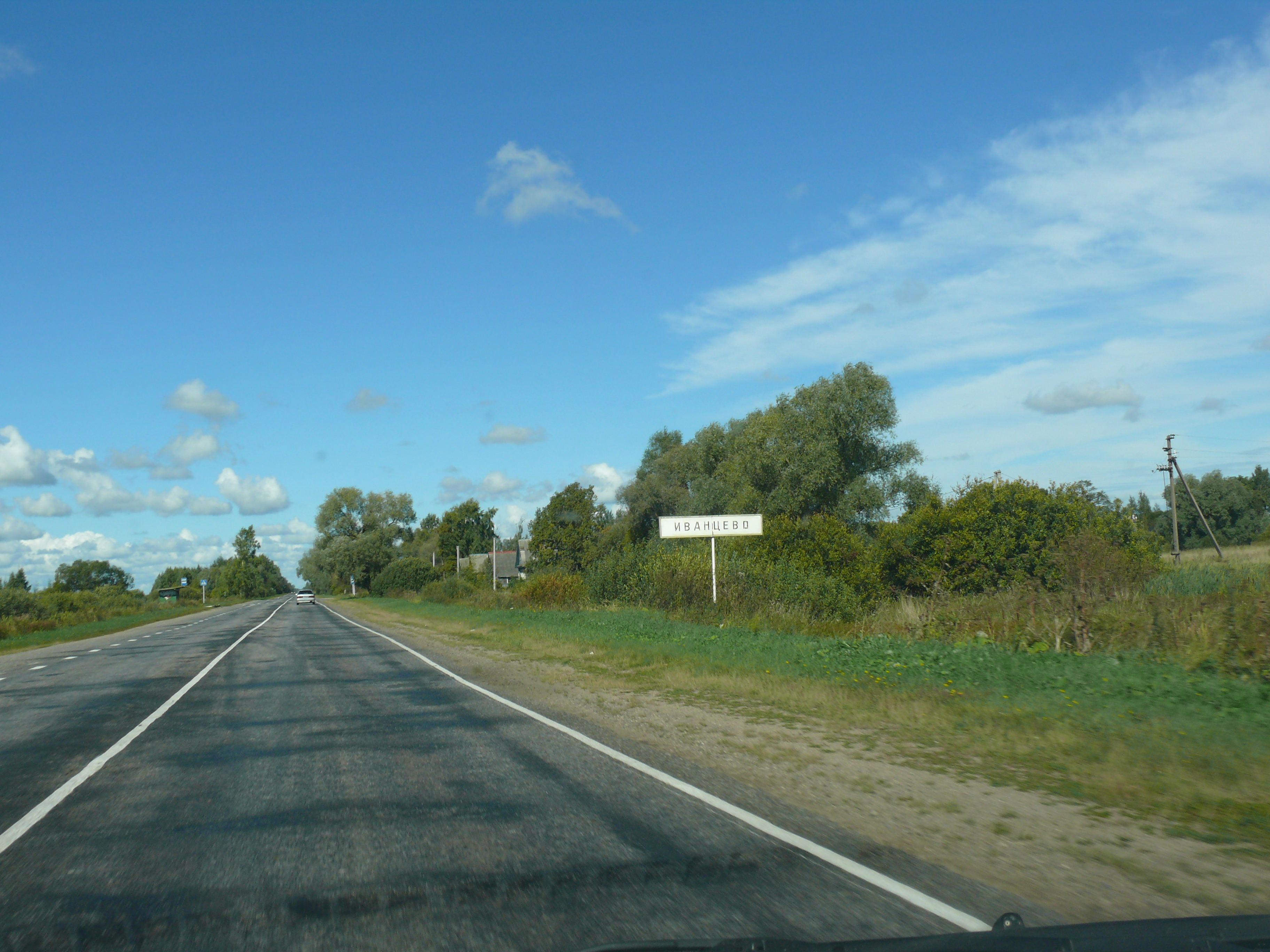 Деревня Иванцево Старорусского района Новгородской области